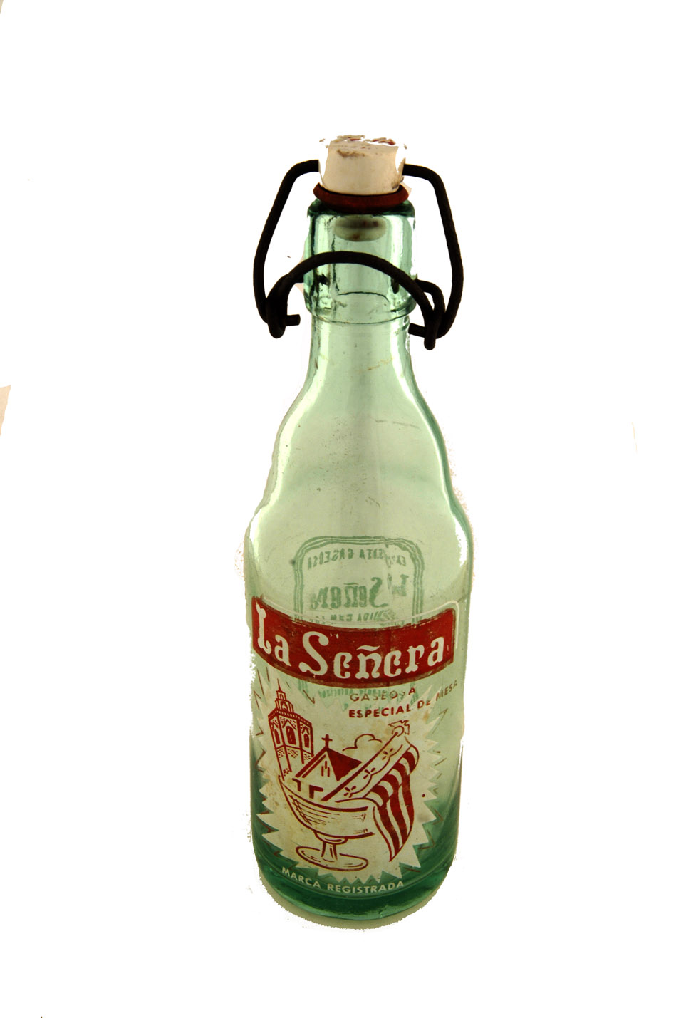 Fotografies dels objectes de l'exposició permanent de la sala "Secà i Muntanya" del Museu Valencià d'Etnologia - Fotografies de Mateo Gamon.